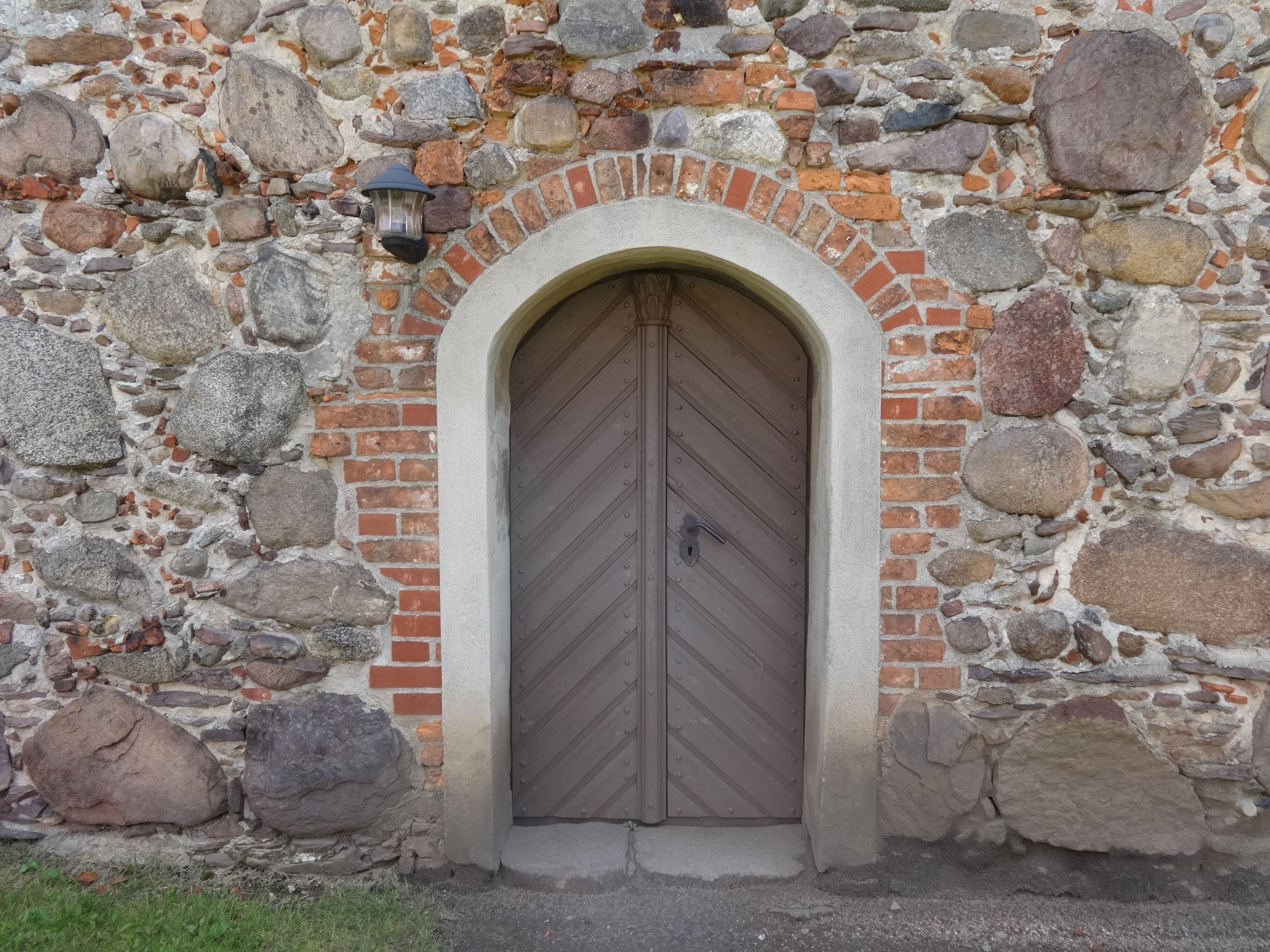 Die Dorfkirche in Pitschen-Pickel ist ein Saalbau aus Feldsteinen aus dem 15. Jahrhundert mit einer Patronatsloge aus dem Jahr 1675. Im Innern befindet sich ein Kanzelaltar mit einem Aufsatz aus dem Jahr 1684 sowie ein Kanzelkorb aus 1725/1726.